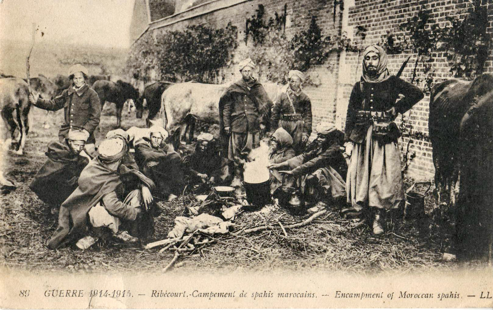 Carte postale ancienne éditée par LL, n°89, série "Guerre 1914-1915" n°89 :RIBÉCOURT - Campement de spahis marocains.